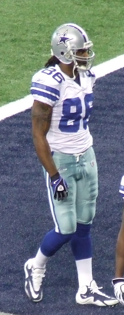 Isaiah Stanback